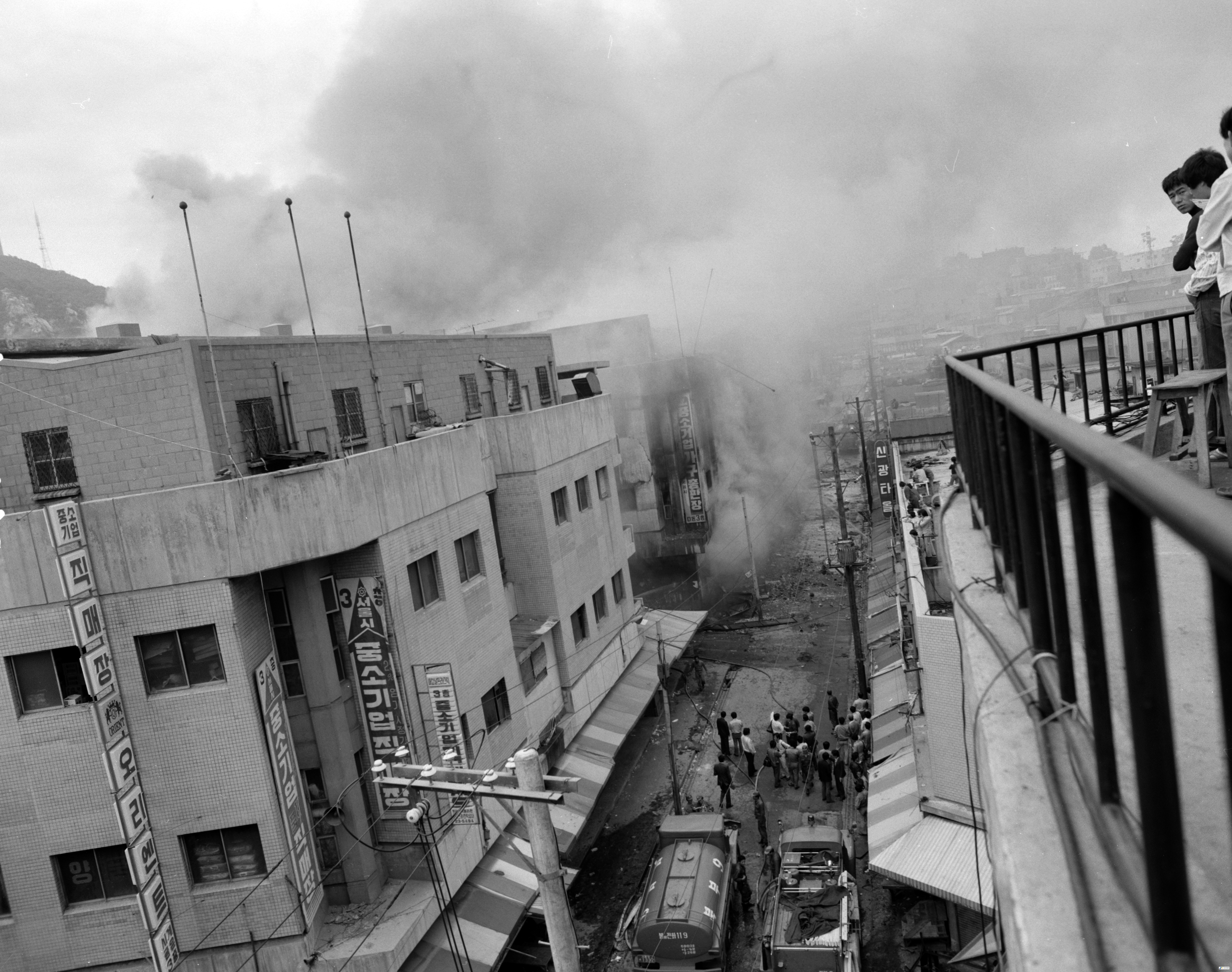 서울특별시 소방재난본부 소장 사진. photos of Seoul Metropolitan Fire & Disaster Headquarters. 이 파일은 크리에이티브 커먼즈 저작자표시-동일조건변경허락 4.0 국제 라이선스로 배포됩니다. 단 누구인지 구별 가능한 특정 인물이 사진에 포함되어 있을 경우 사용 전에 서울특별시 소방재난본부 및 해당 인물의 승인을 받으셔야합니다. 감사합니다. evidence of permission